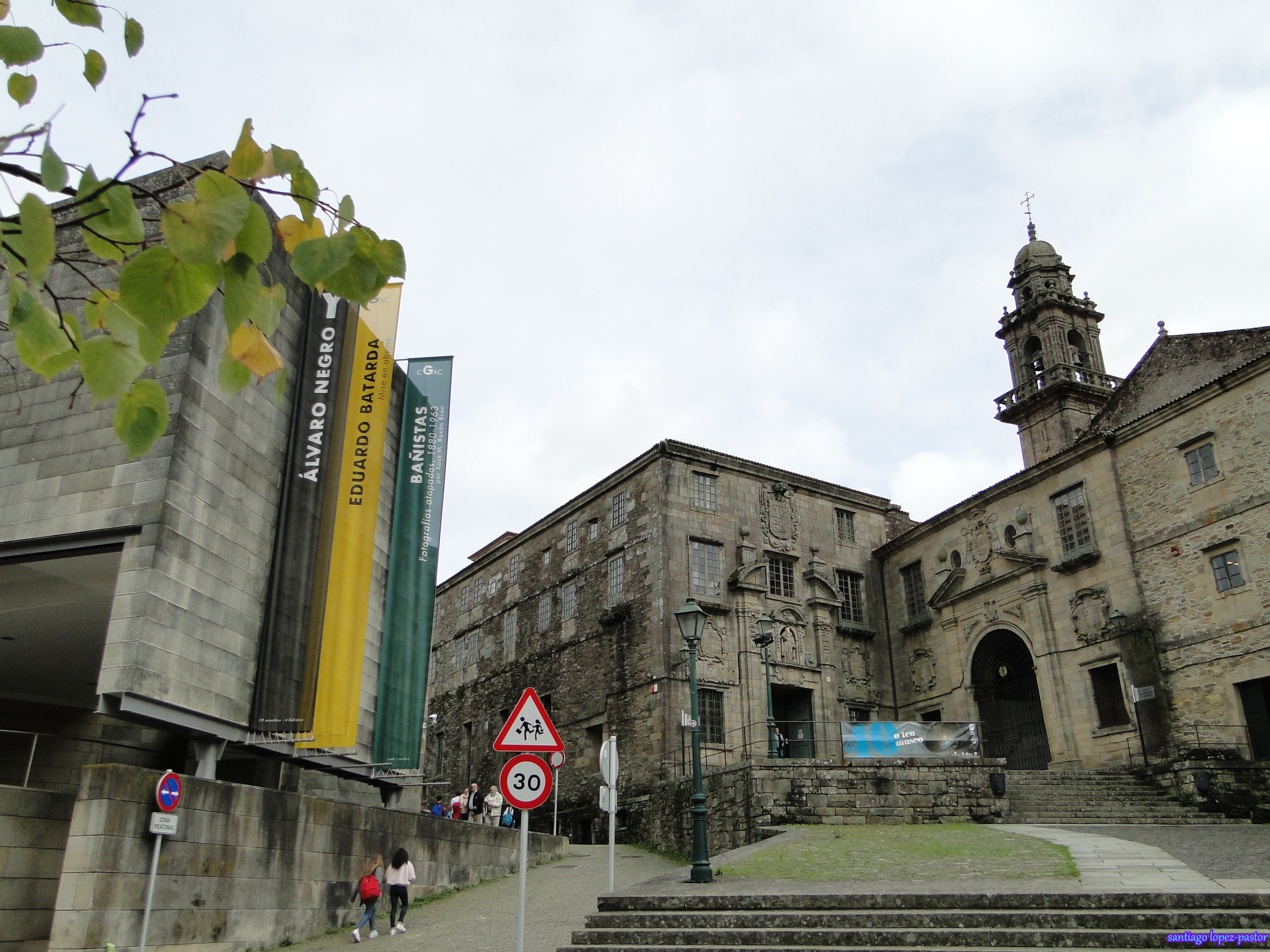 Museo do Pobo Galego. Convento de Santo Domingo de Bonaval.